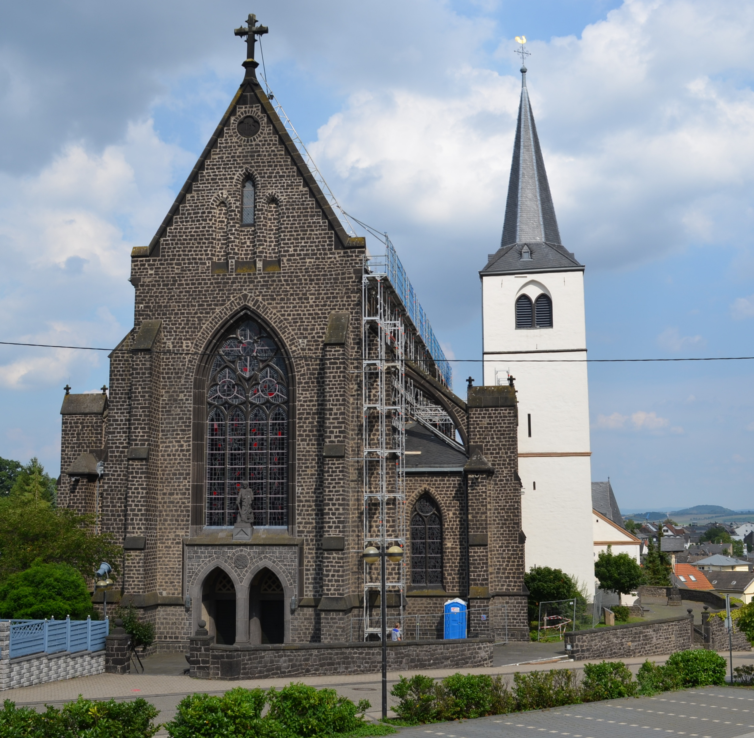 Sint-Cyriacuskerk (links de nieuwbouw uit de 19e eeuw, rechts de oude romaanse kerk)